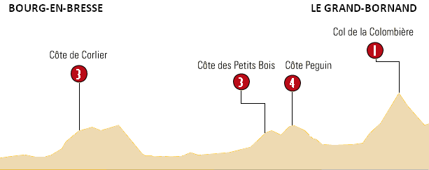 Profile of stage 7 of the 2007 Tour de France - 7e etappe v/d Ronde van Frankrijk 2007